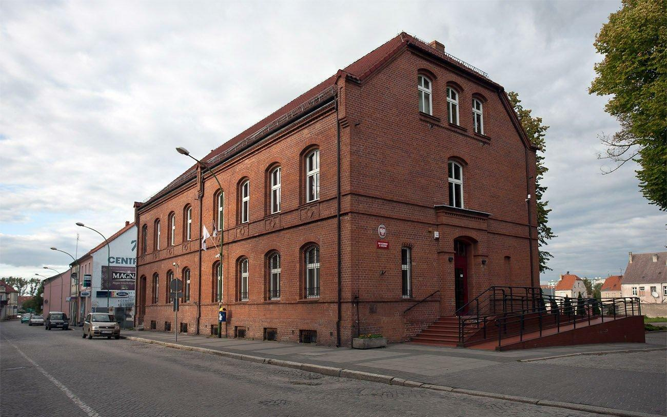 Nieopodal rynku, przy ul. Kościuszki 30 zachowany budynek o ceglanej elewacji. Dziś mieści Sąd Rejonowy.